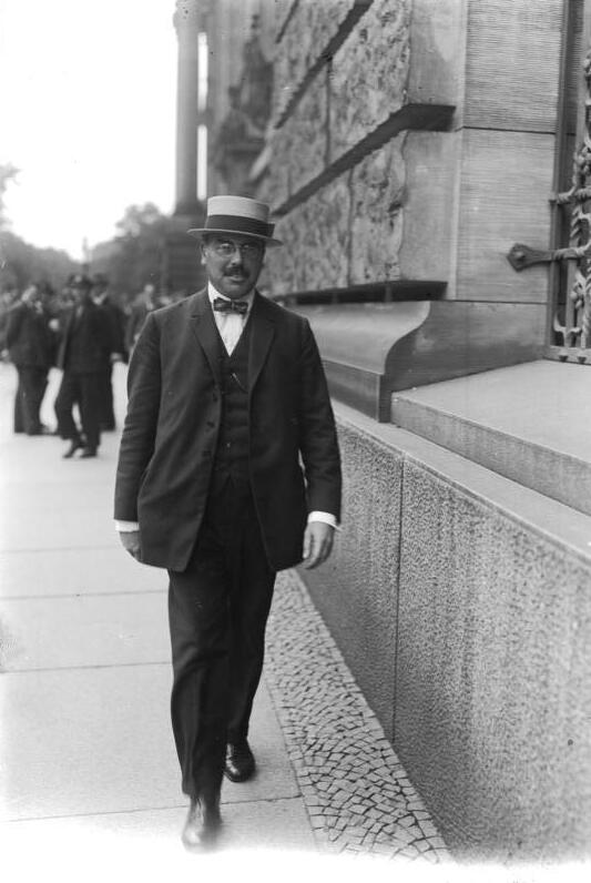 Zum Regierungswechsel in Deutschland. Der neue Reichsfinanzminister Helferding, sozialdemokratische Partei.